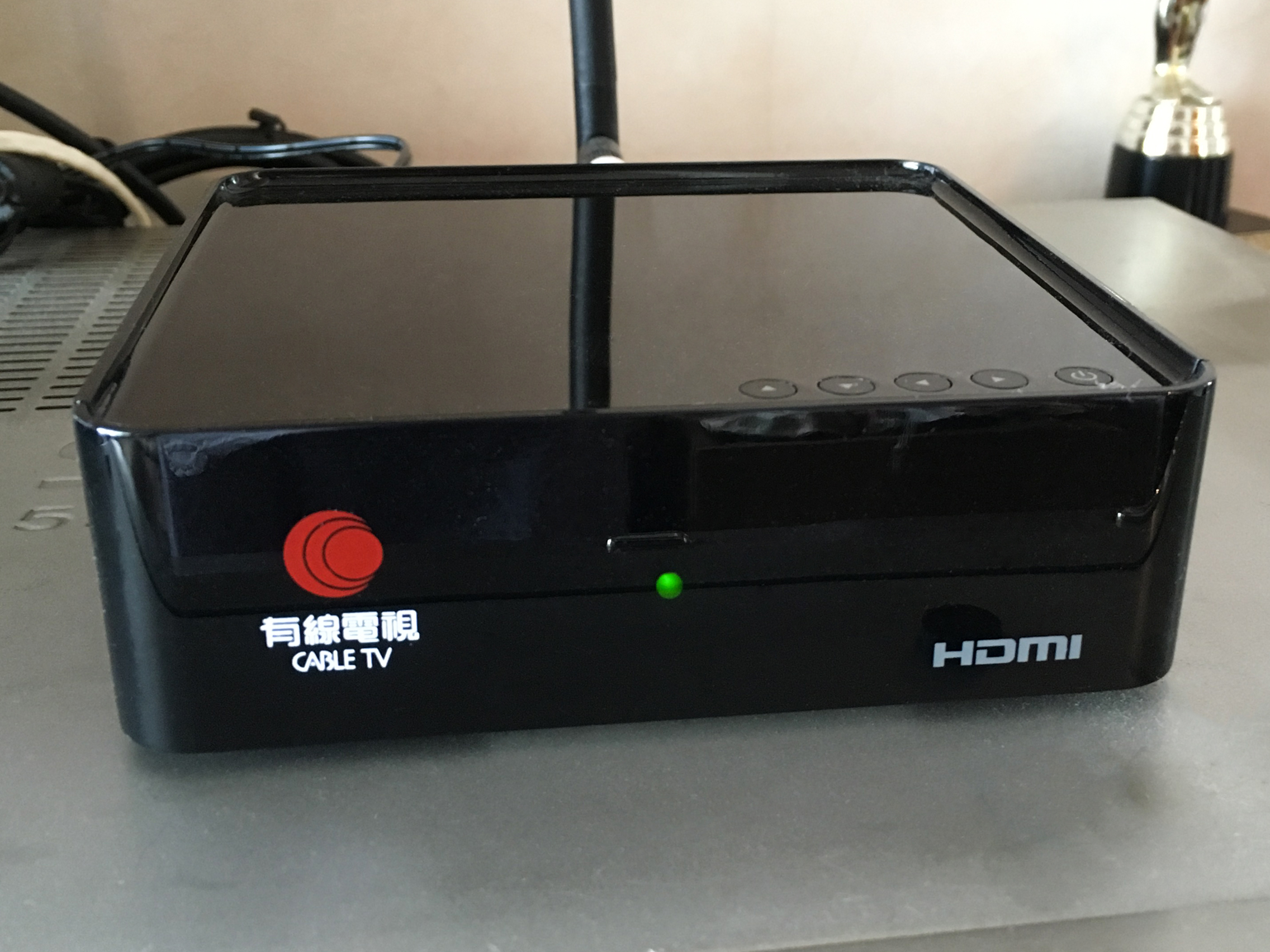 Cable TV FunHub